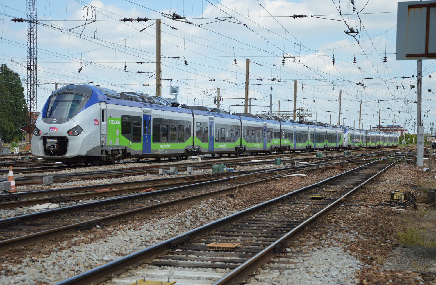 B 84511-12+B 84515-16 en unité mixte pour Lille-Flandre